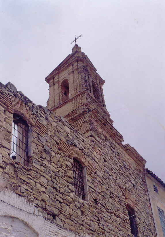 Hospital de Valenzuela (Córdoba)